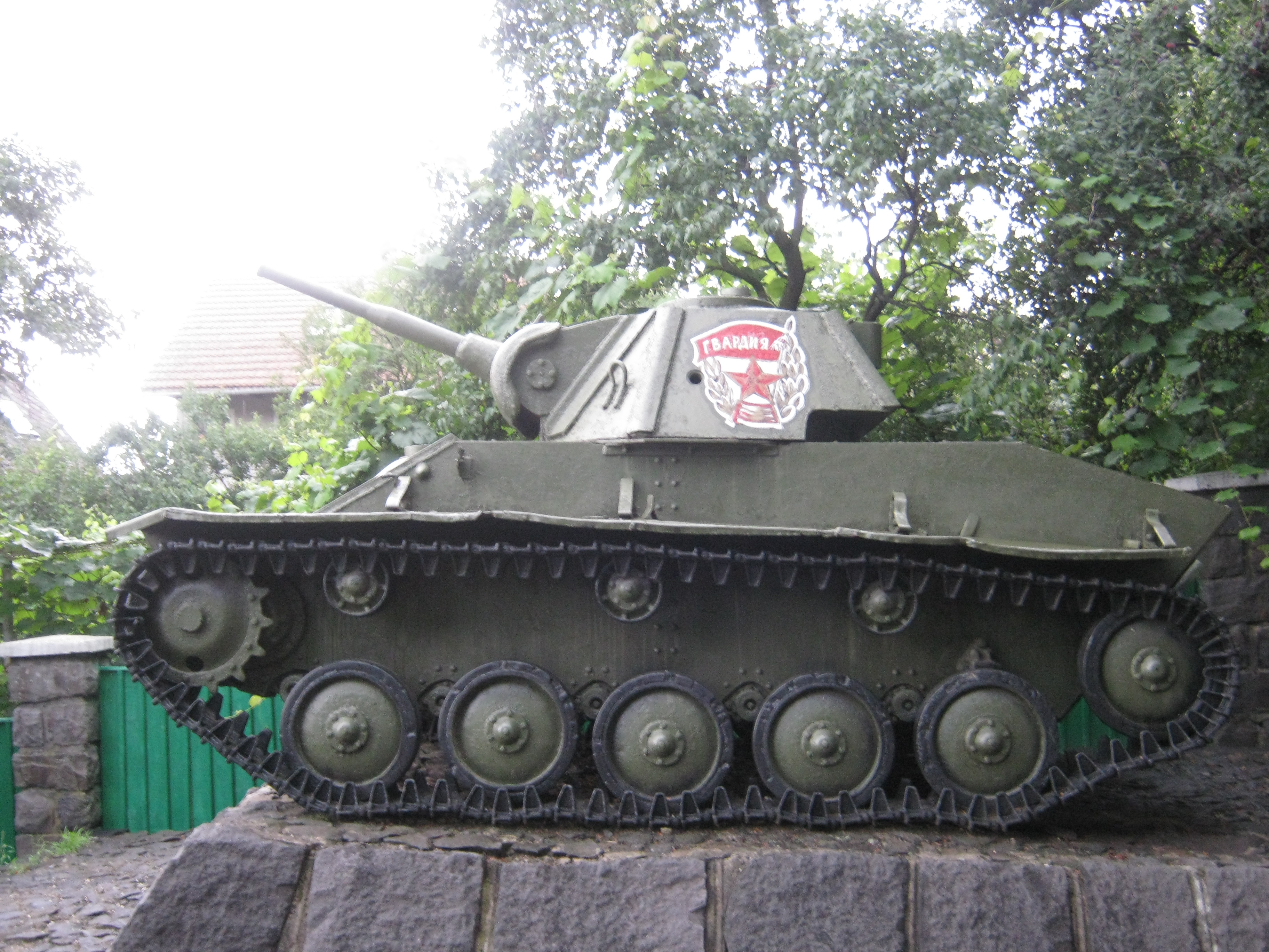 Фотография танка Т-70 на мемориальном комплексе в г.Ужгород (боковая проекция)